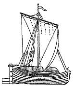 Поморский Шитик